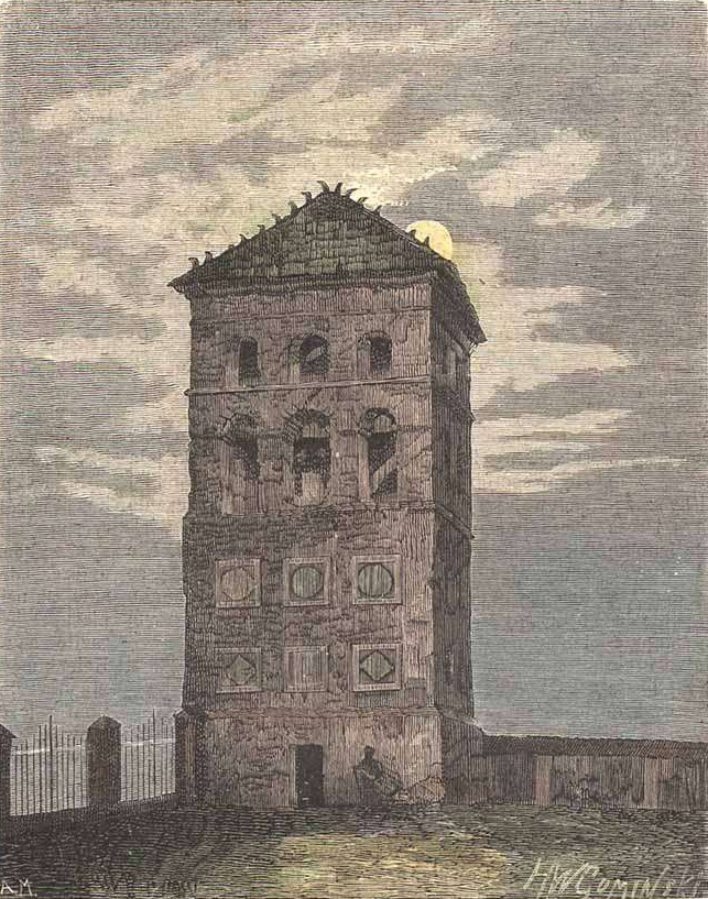 Беларуская (тарашкевіца): Нясьвіж (Niaśviž), Замкавая вежа (Zamkavaja vieža)